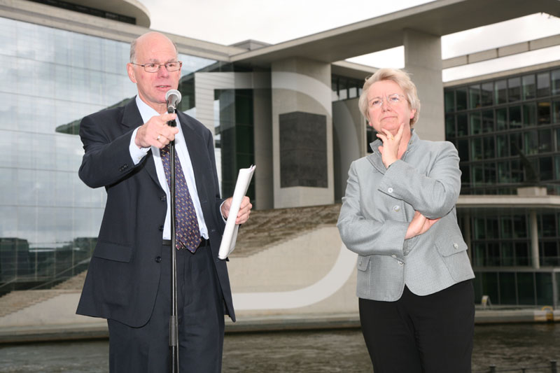 Eröffnung "D wie Demokratie" durch Bundestagspräsident Norbert Lammert und Bundesforschungsministerin Annette Schavan